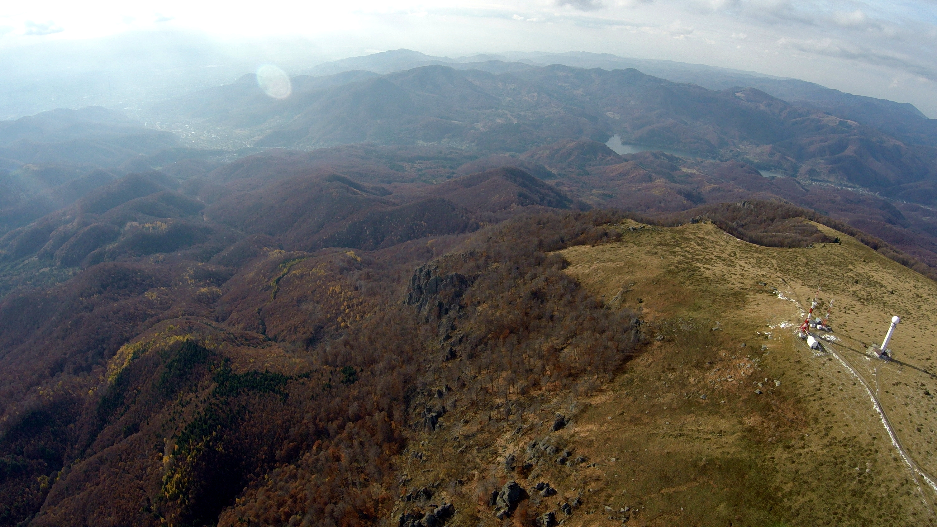 Vârful Igniș, văzut din parapantă. În fundal se pot vedea: Lacul Firiza, Cartierul Ferneziu, Baia Mare și turnul combinatului